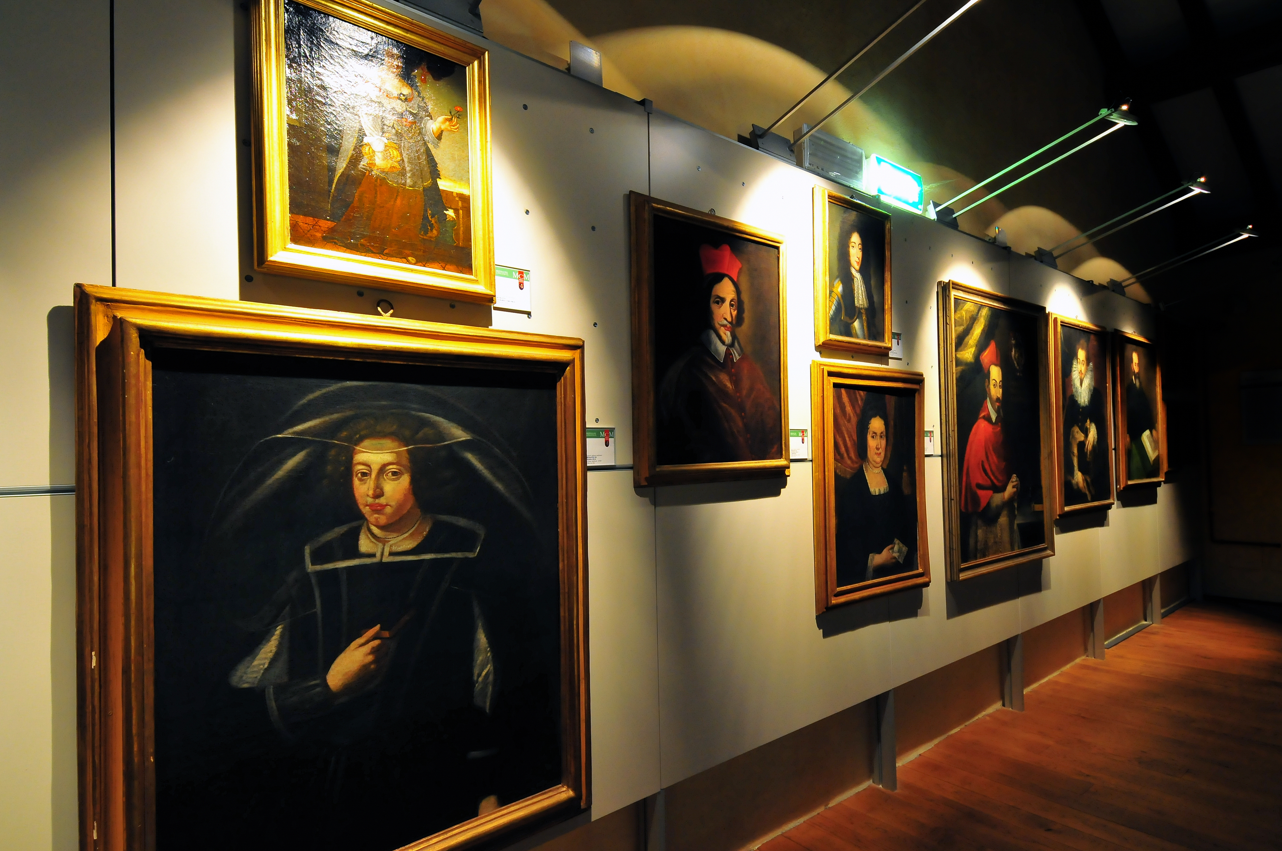 Il Museo Civico di Mirandola si trovava all’interno del Castello dei Pico, prestigiosa sede della nobile famiglia che per quattrocento anni, dal 1311 al 1710, governò la città. Il percorso espositivo era strutturato in dodici sezioni, attraverso le quali veniva delineato un quadro differenziato e vario del patrimonio storico e artistico cittadino. Il Museo comprendeva una collezione archeologica; una raccolta di monete e medaglie dei Pico; committenze religiose; ritratti dei Pico, degli Este, di illustri personaggi mirandolesi tra ‘700 e ‘800; una sezione dedicata ai filosofi Giovanni e Giovan Francesco Pico; la sala della musica; opere provenienti da donazioni (quadri, mobili antichi e una ricca raccolta di stampe riguardanti il territorio) e dal Monte di Pietà; una raccolta di armi del XV e XVI secolo.